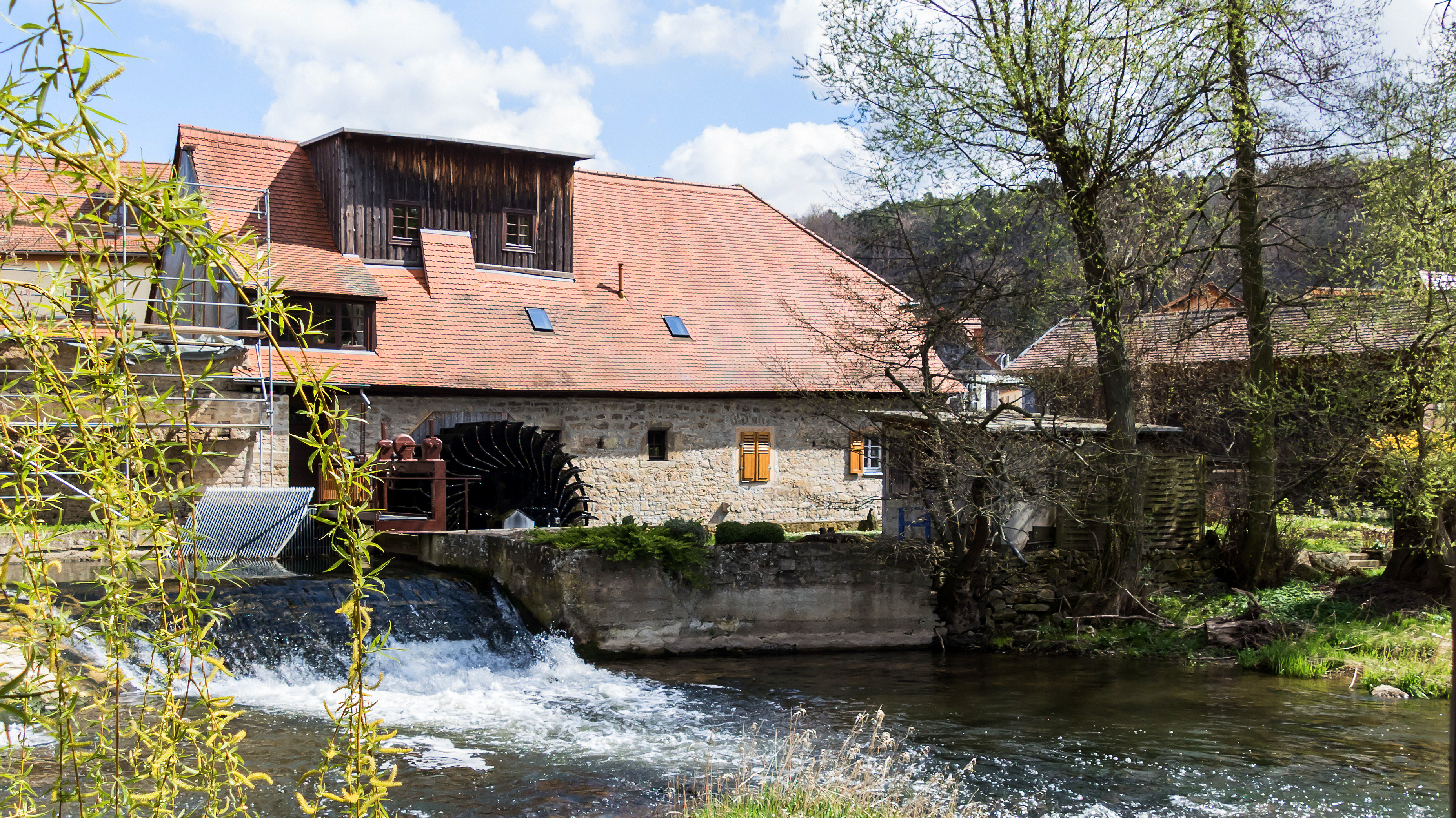 Buchfart Mühle, Gehöft und Mahltechnik